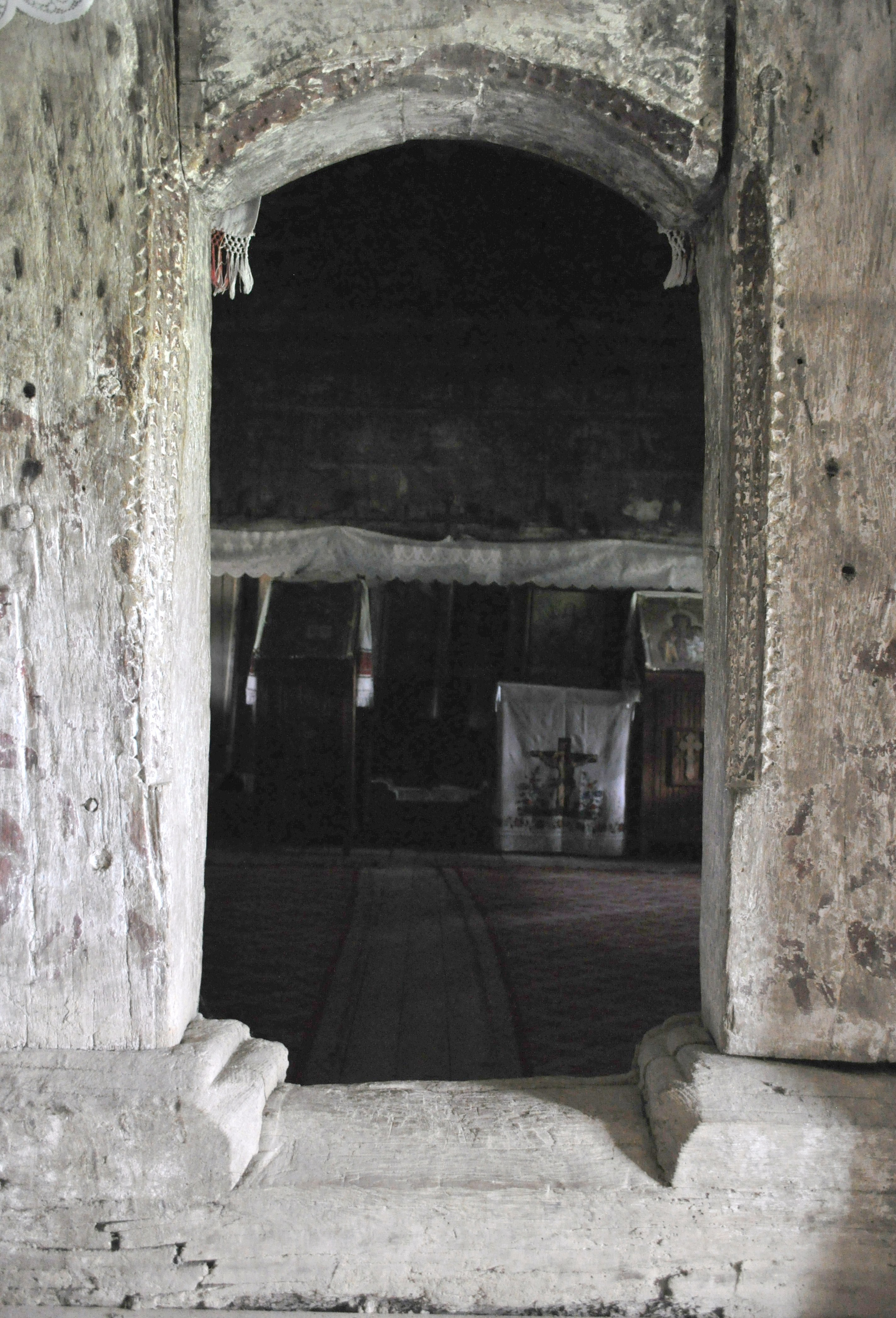 Portalul interior. Biserica de lemn „Sfinții Arhangheli” din Berindu, județul Cluj